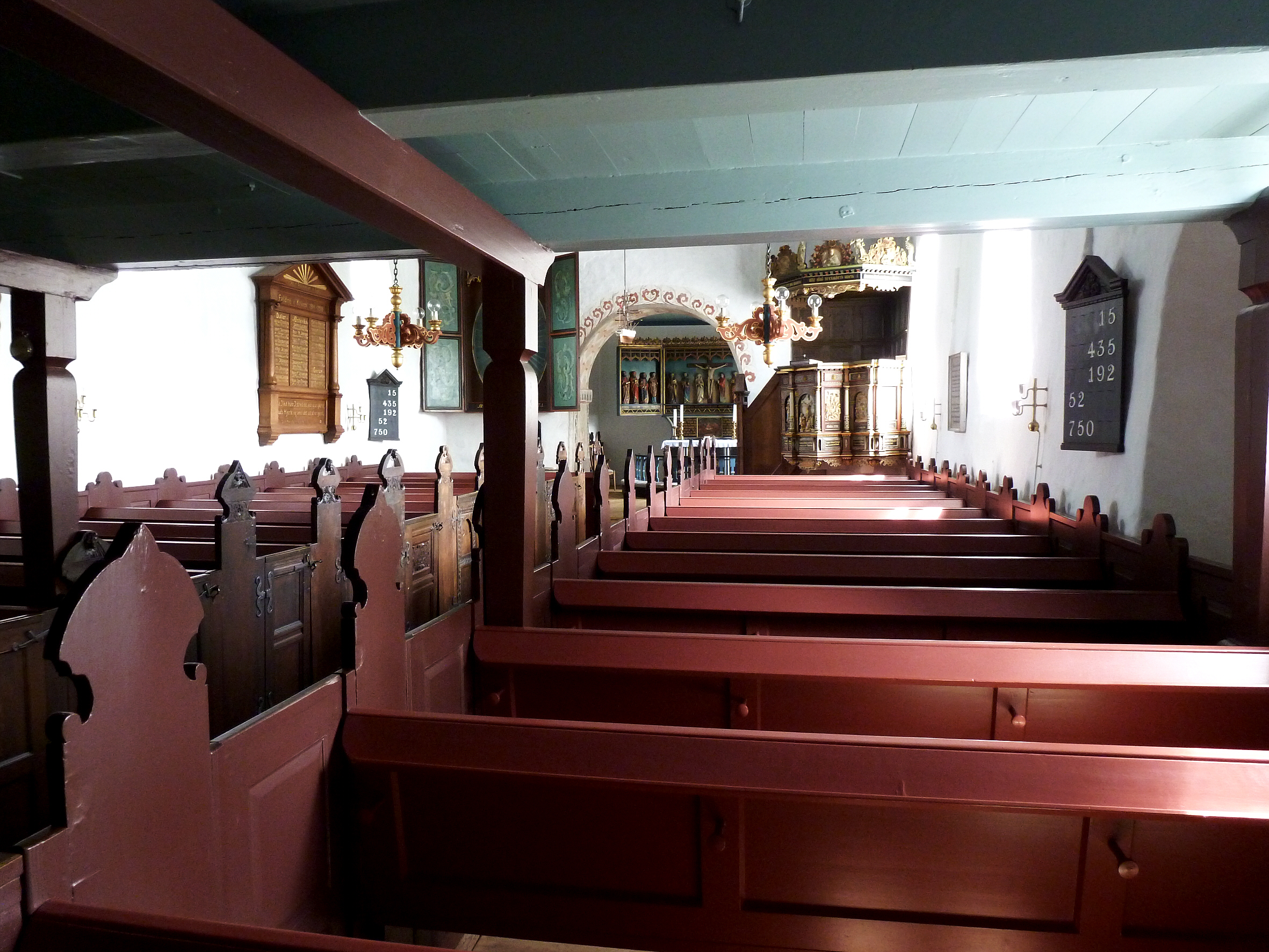 Innenansicht der Kirche von Daler, einem Ortsteil von Hoyer in Dänemark.